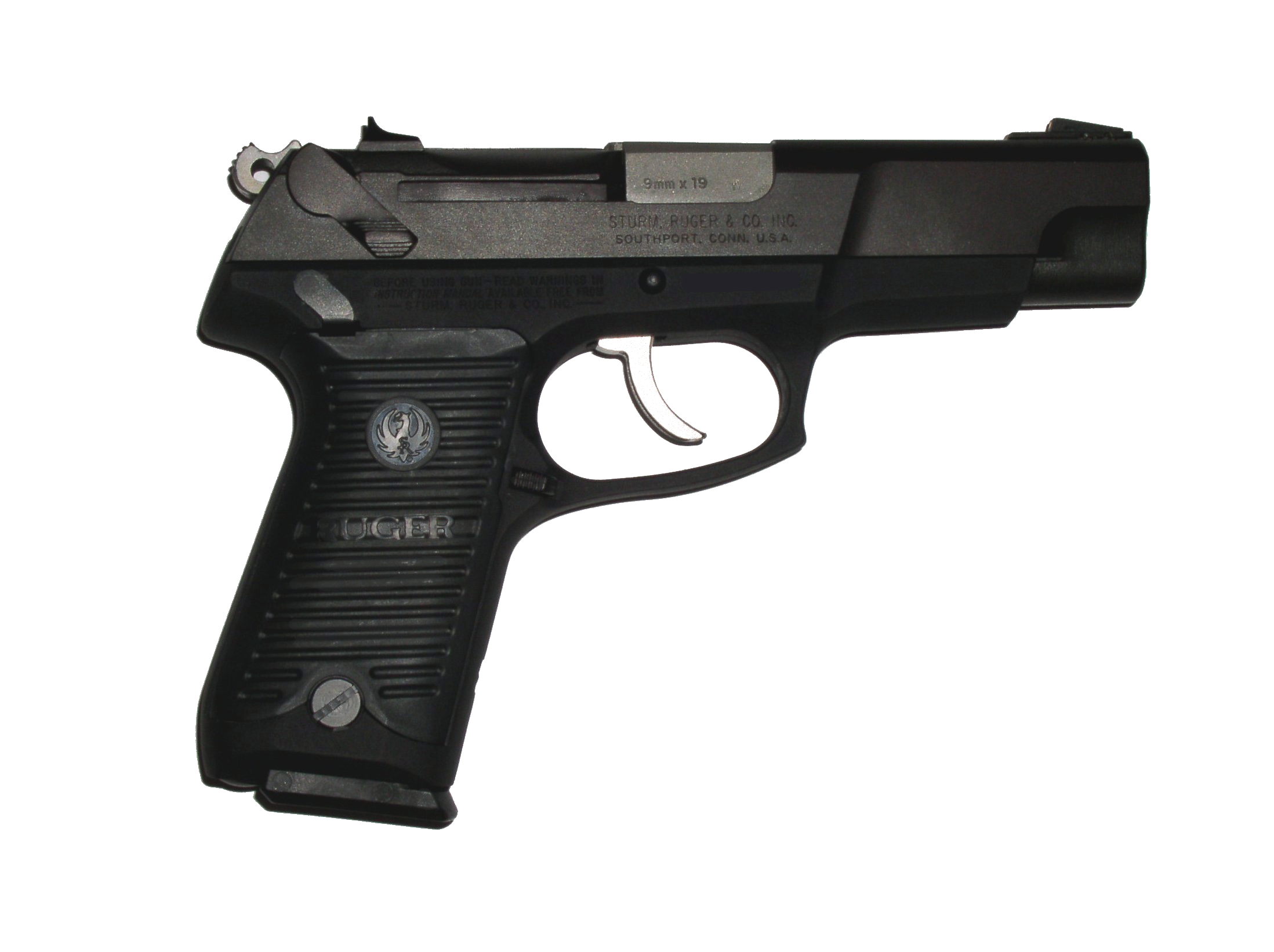 A standard Ruger P89 right-side view